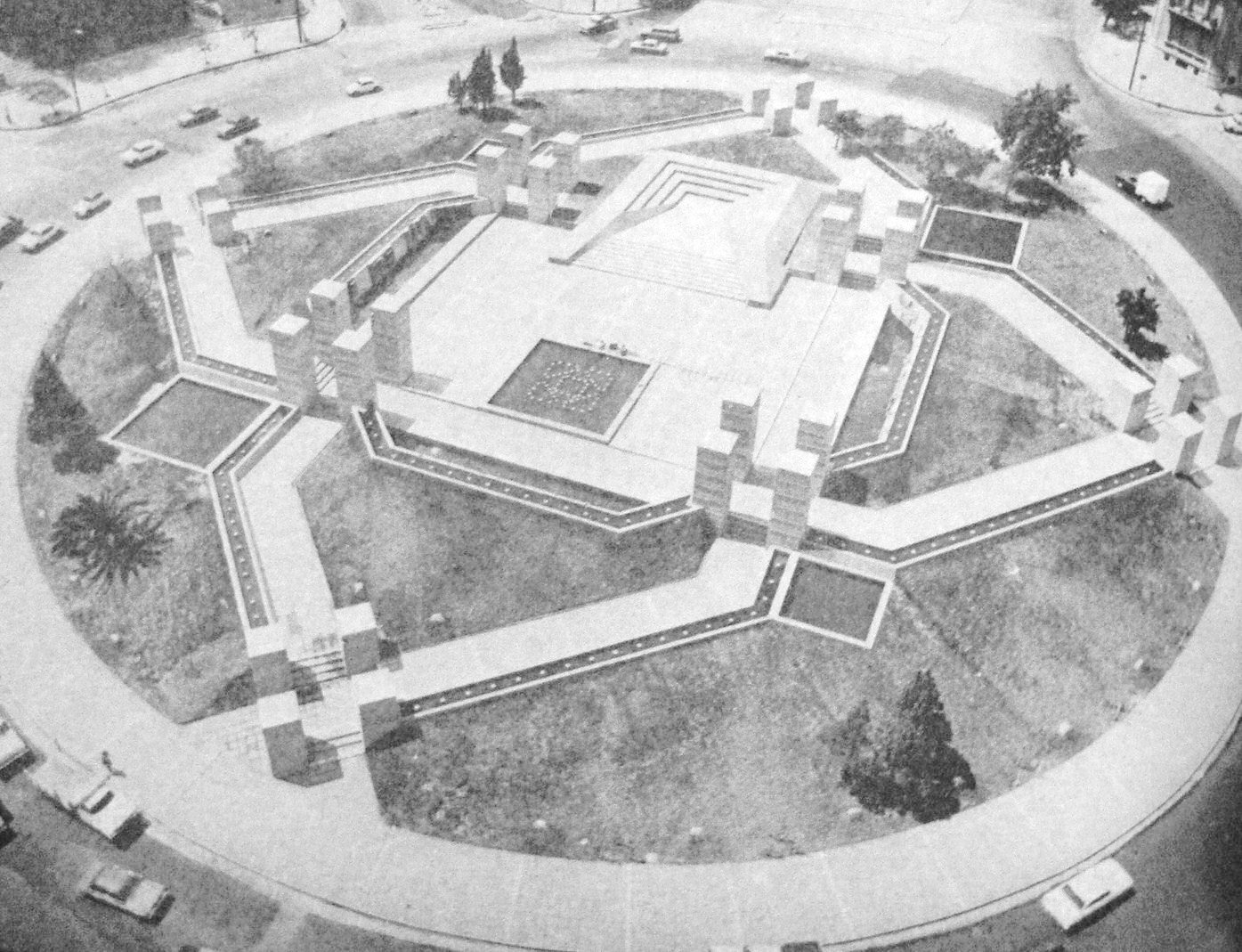 Vista aérea de la Plaza España, en Córdoba, Argentina tomada hacia 1980.